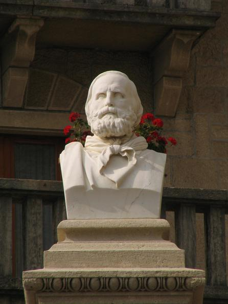 Busto di Giuseppe Garibaldi a San Marino, primo monumento in assoluto al mondo dedicato all'Eroe dei due mondi. Opera di Stefano Galletti, è stato eretto nel 1882.